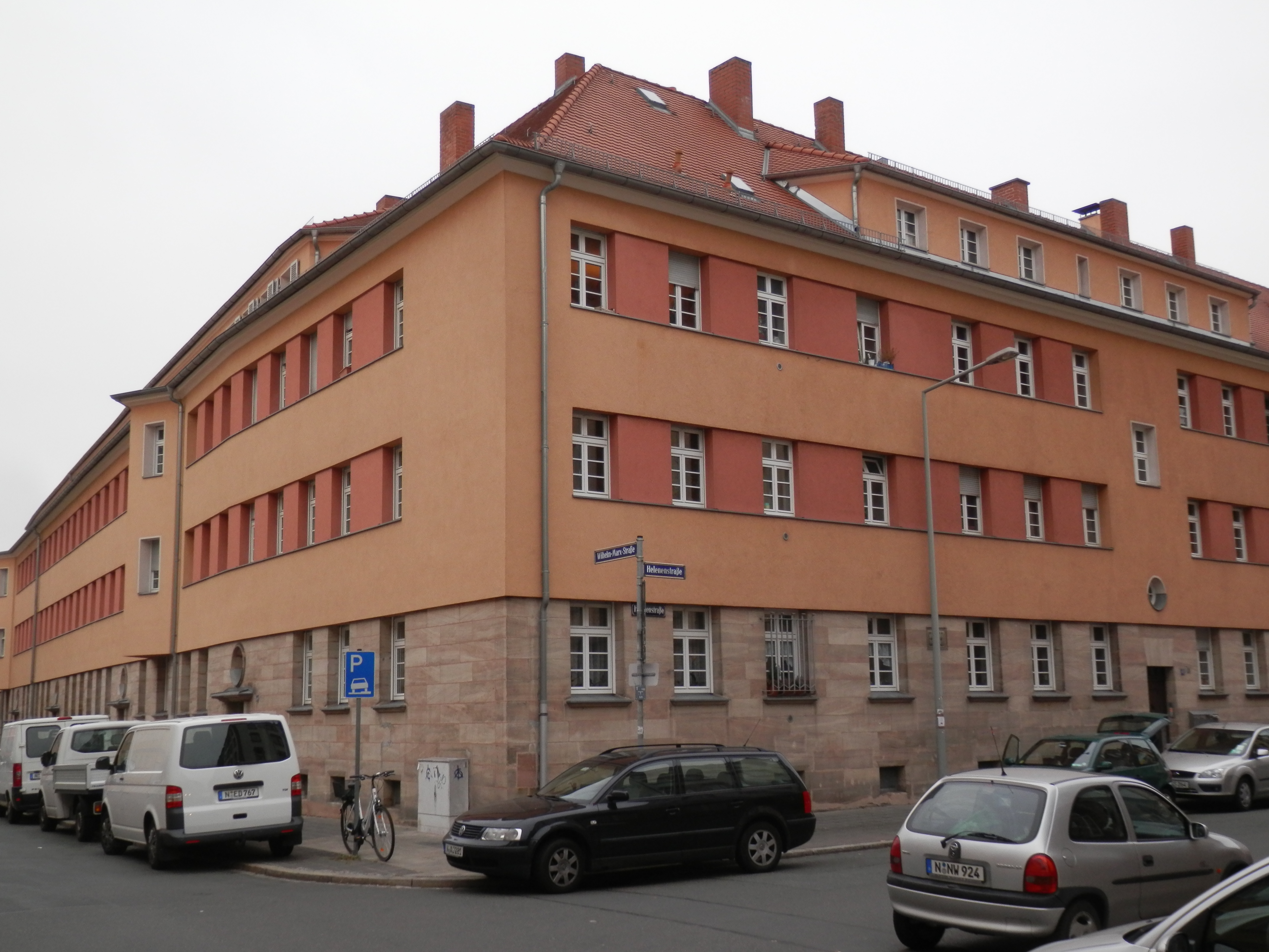 Häuser der städtischen Wohnungsbaugesellschaft Nürnberg von 1925 an der Ecke Wilhelm-Marx-/Helenenstraße